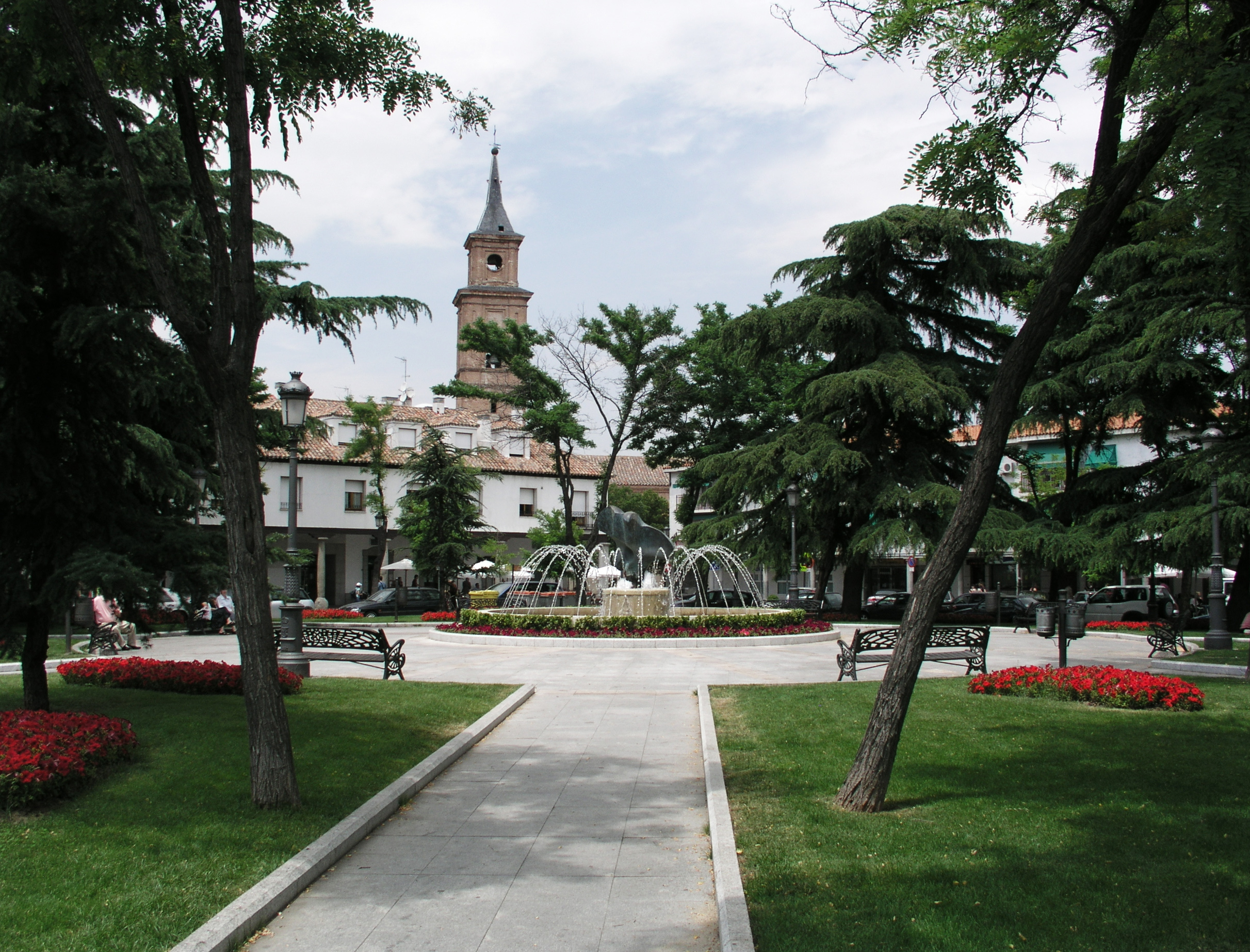 Barajas Plaza Hermanos Faco y Faco y Álvarez de Toledo, Barajas district, Madrid, Spain